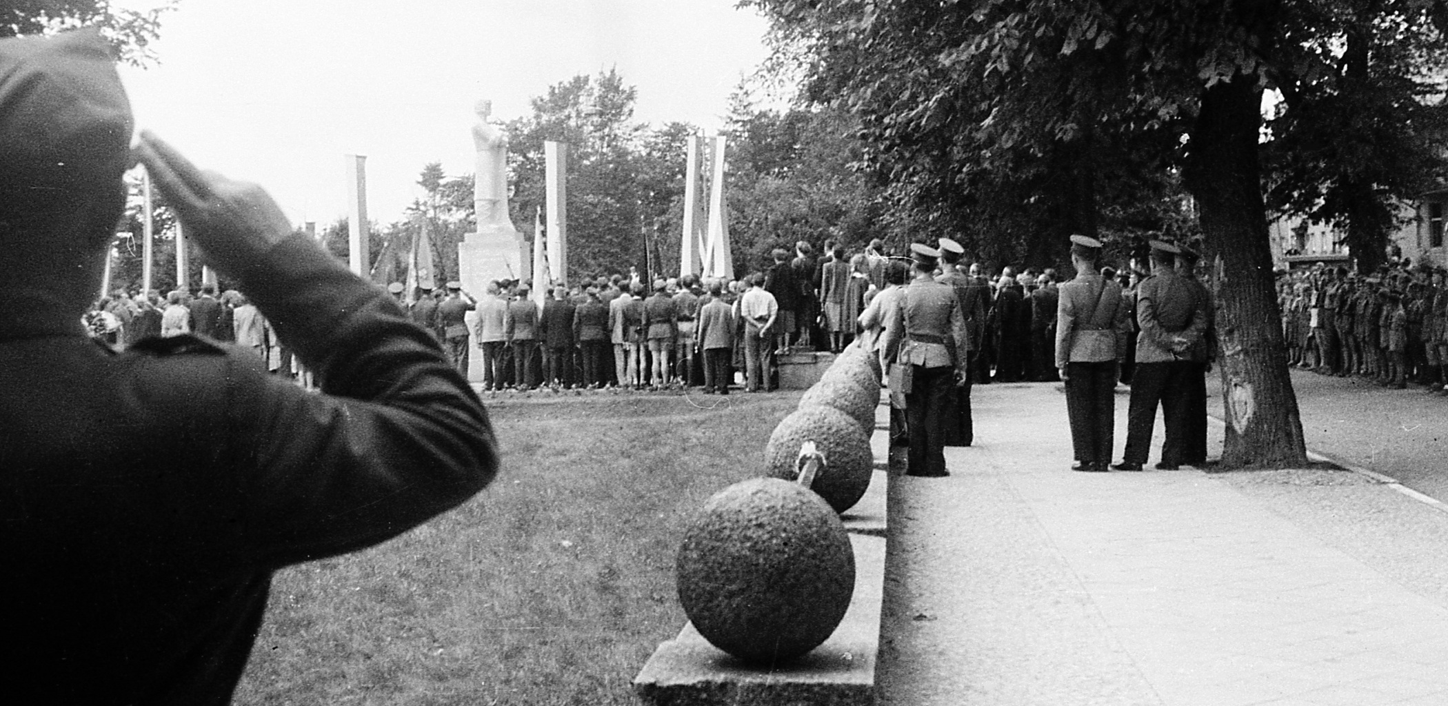 odsłonięcie pomnika Piasta Kołodzieja w Złotowie